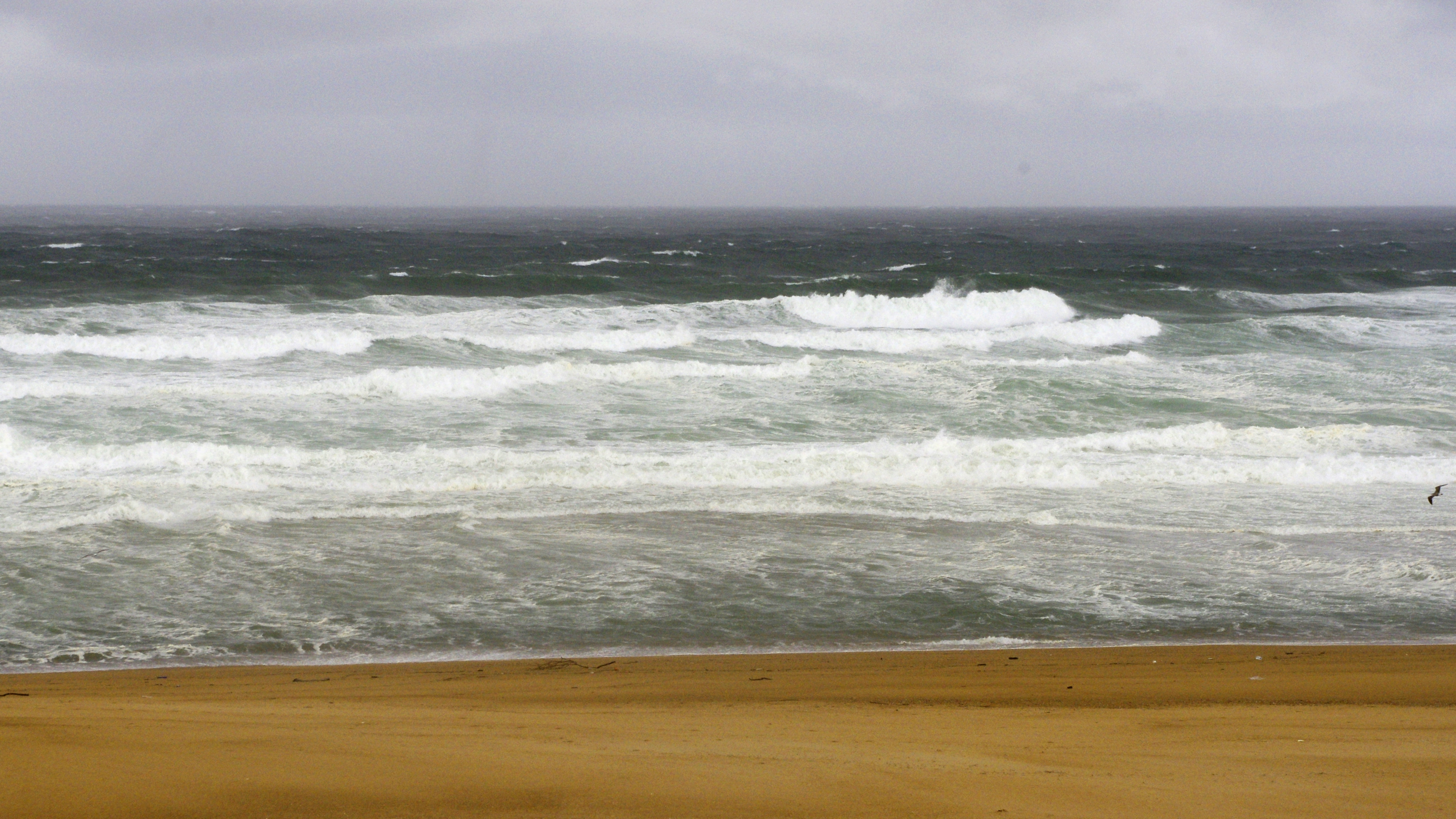 Labenne-Océan, la plage sous la pluie.